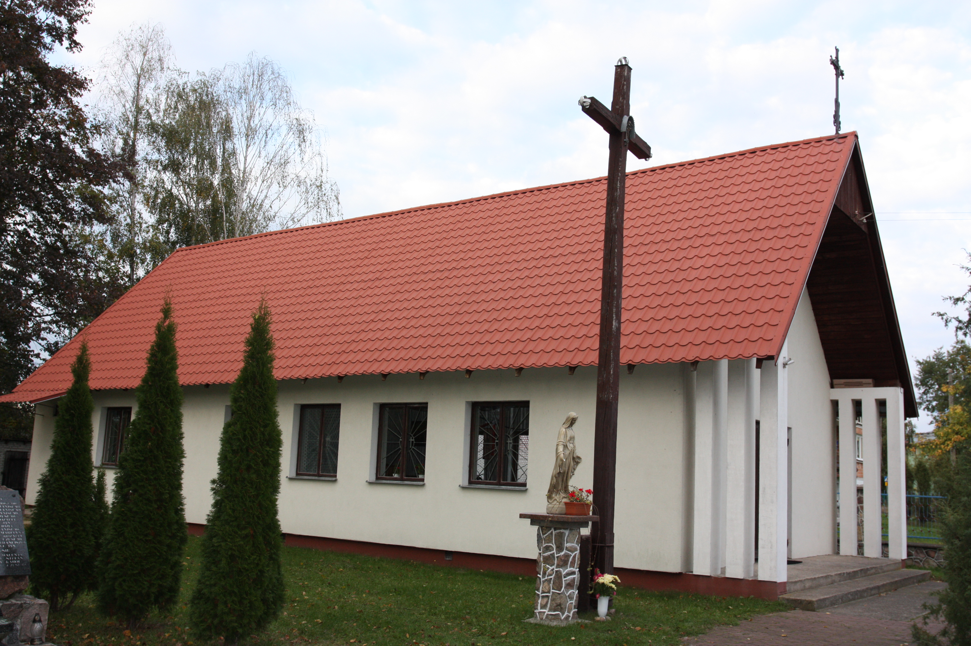 Kaplica w Zarzetce